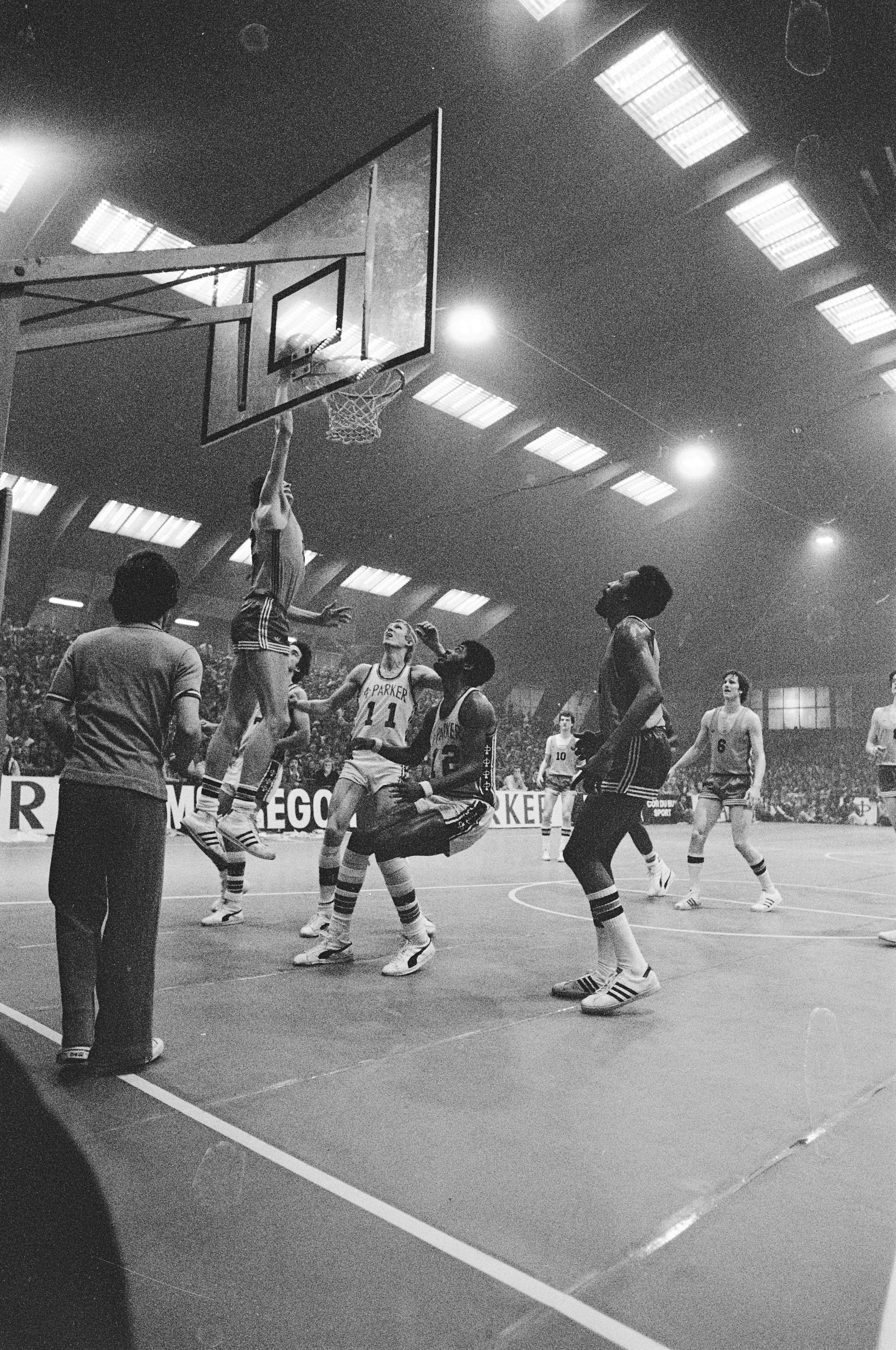 Collectie / Archief : Fotocollectie Anefo Reportage / Serie : Basketbal Parker tegen EBBC Beschrijving : Spelmoment Datum : 21 april 1979 Trefwoorden : basketbal, sport Fotograaf : Croes, Rob C. / Anefo Auteursrechthebbende : Nationaal Archief Materiaalsoort : Negatief (zwart/wit) Nummer archiefinventaris : bekijk toegang 2.24.01.05 Bestanddeelnummer : 930-2255